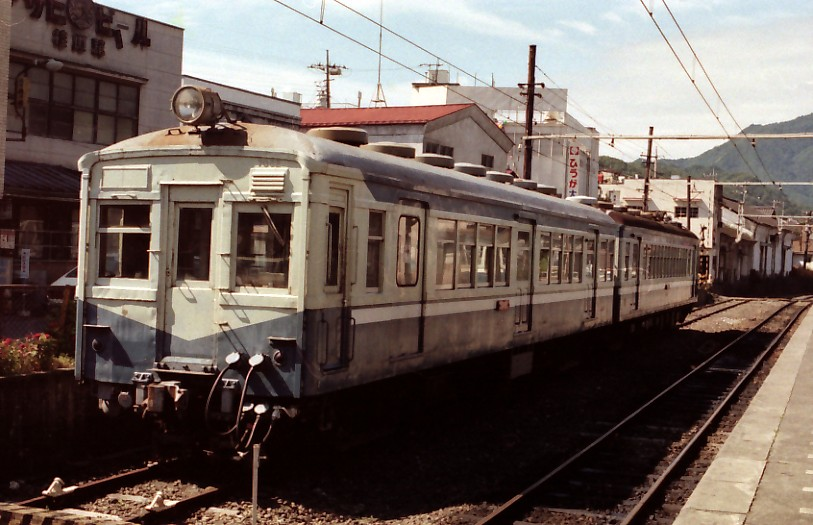 富士急行7000形電車。もと日本国有鉄道クハ11形。